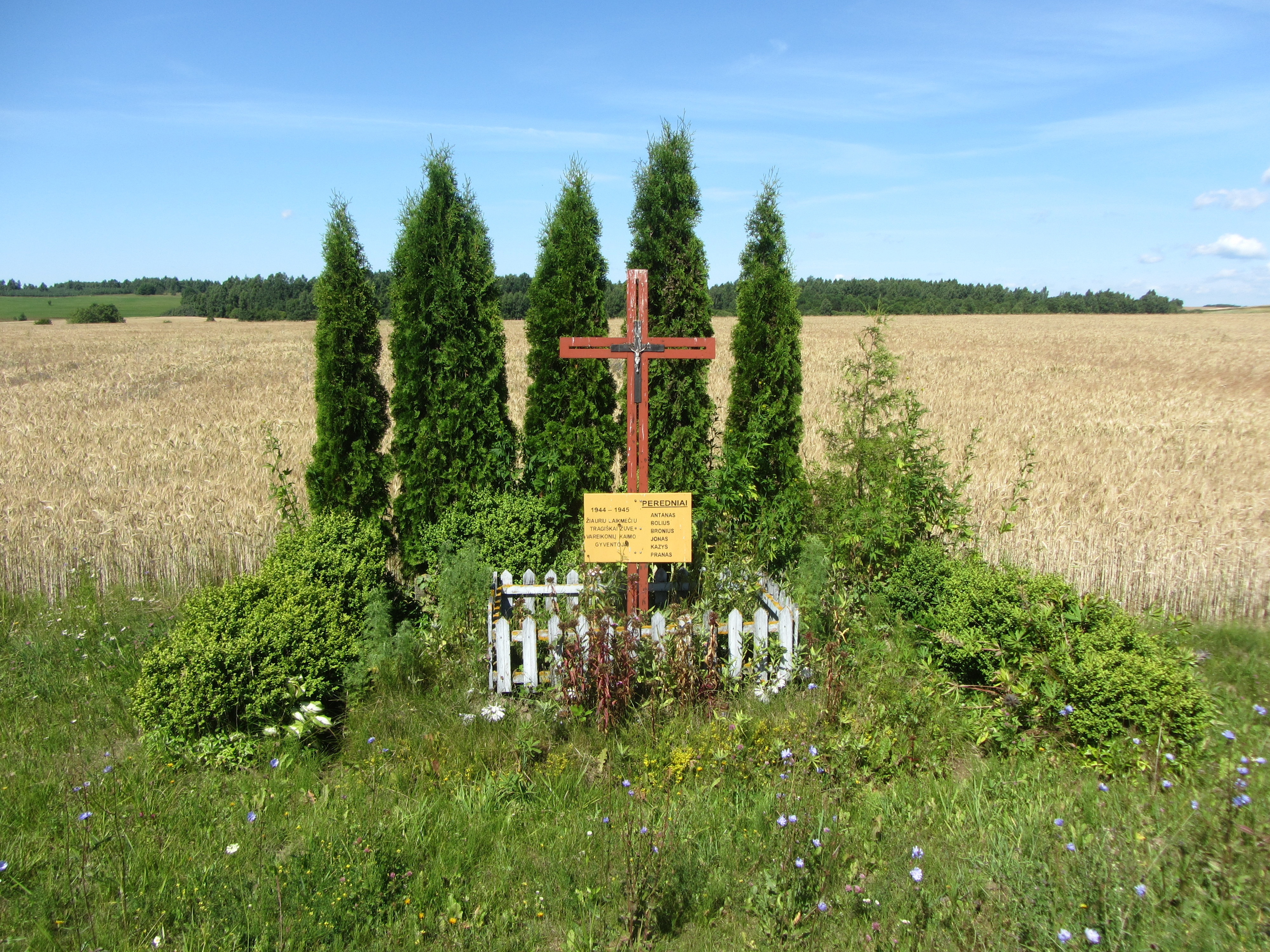 Paparčių sen., Lithuania